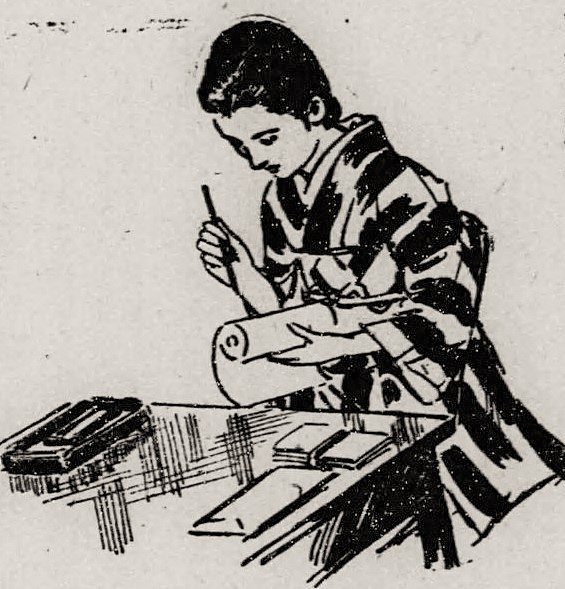 巻紙での手紙の書き方